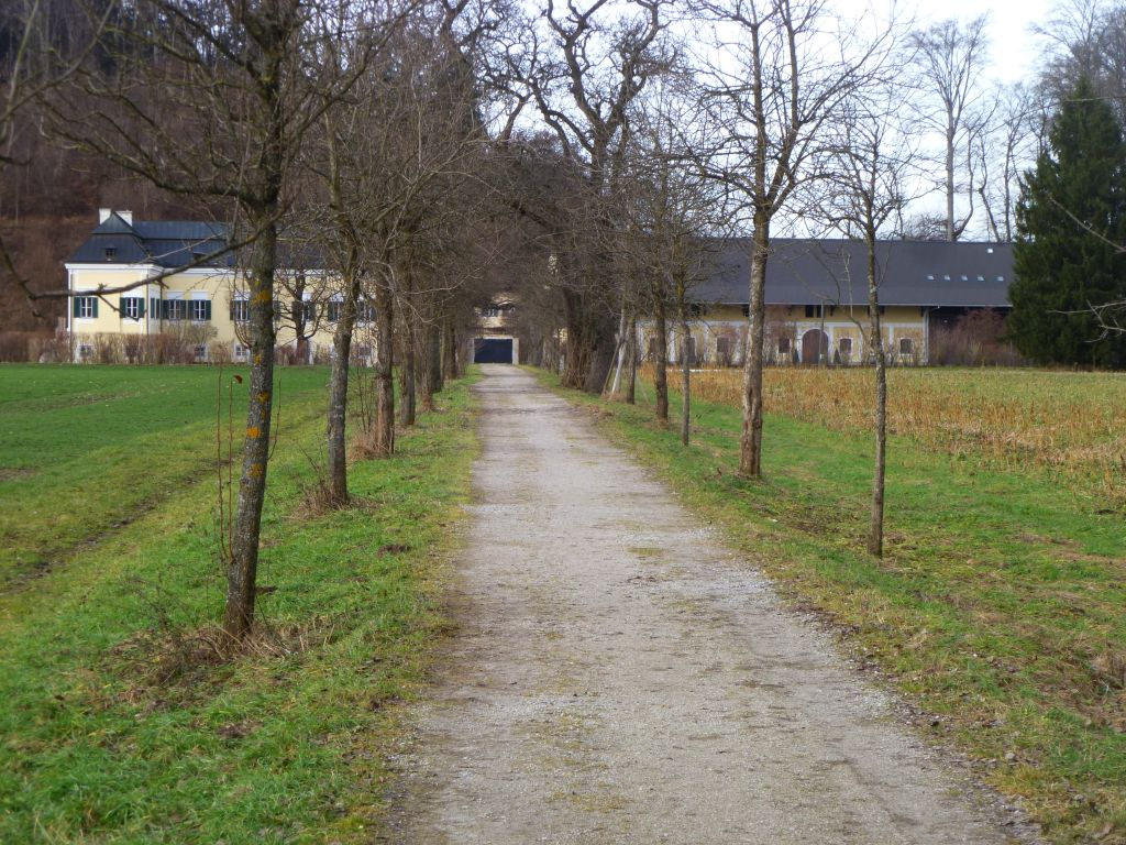 Schloss Montfort (Salzburg) Allee